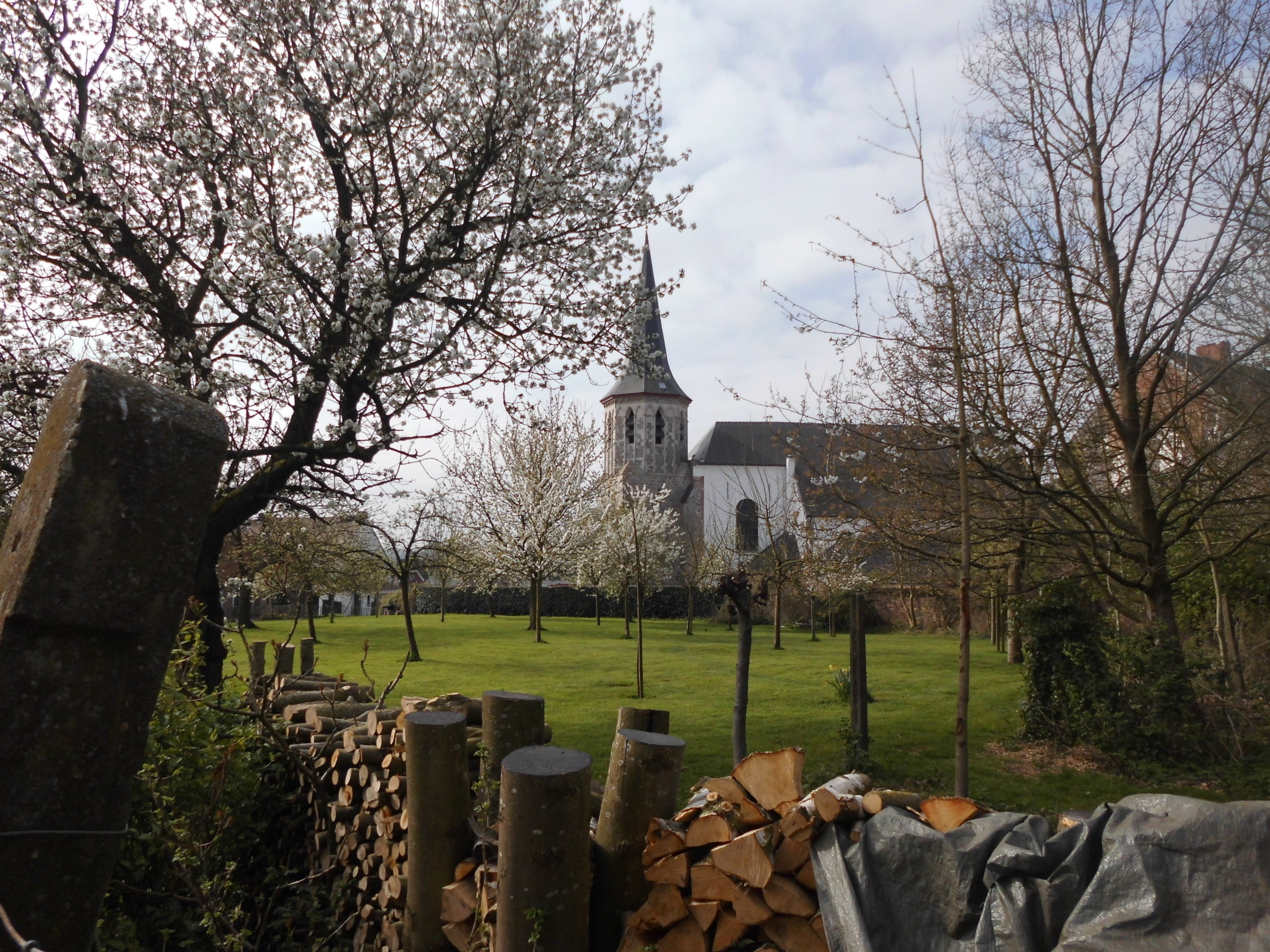 Parochiekerk Heilige Niklaas en Heilige Laurentius - Aaigemdorp - Aaigem - Erpe-Mere - Oost-Vlaanderen - België